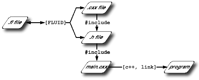 Diagrama de flujo de compilación de código con FLUID.